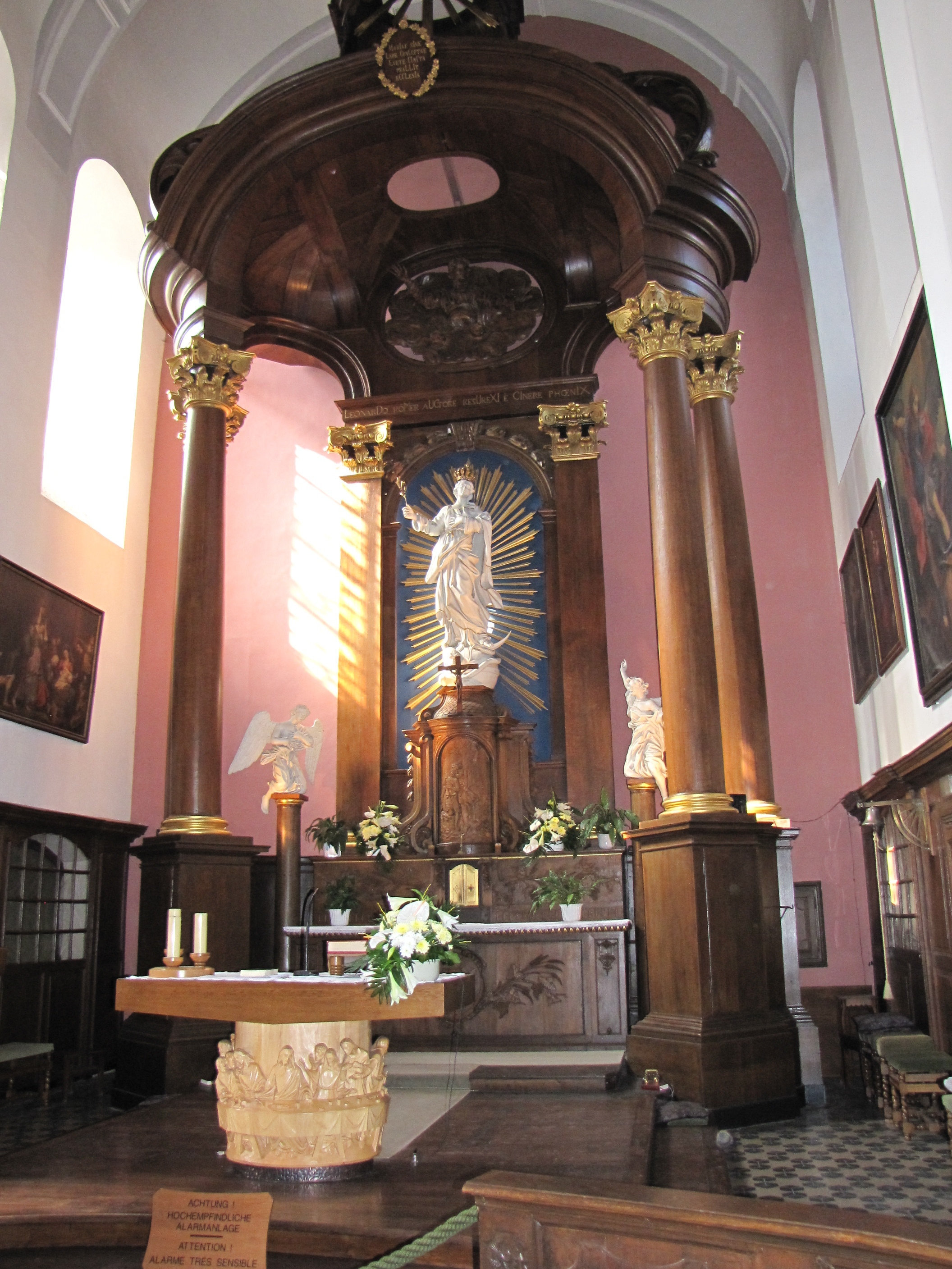 Eglise de l'Immaculée Conception d'Eupen